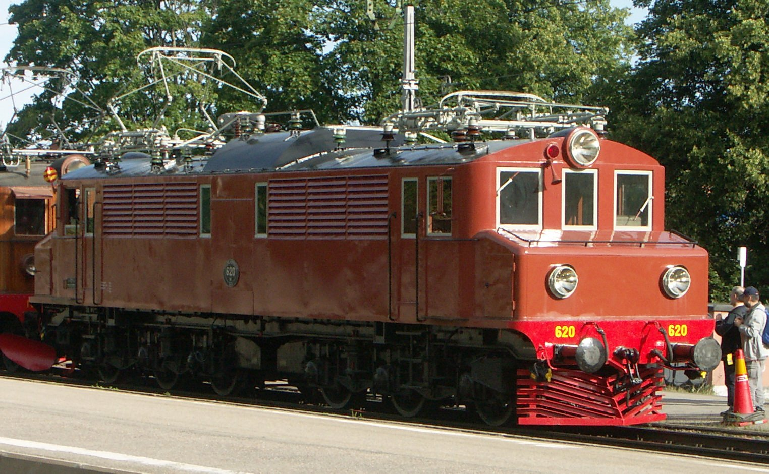 Mg 620 vid järnvägens 150 års jubileum i Gävle 2006